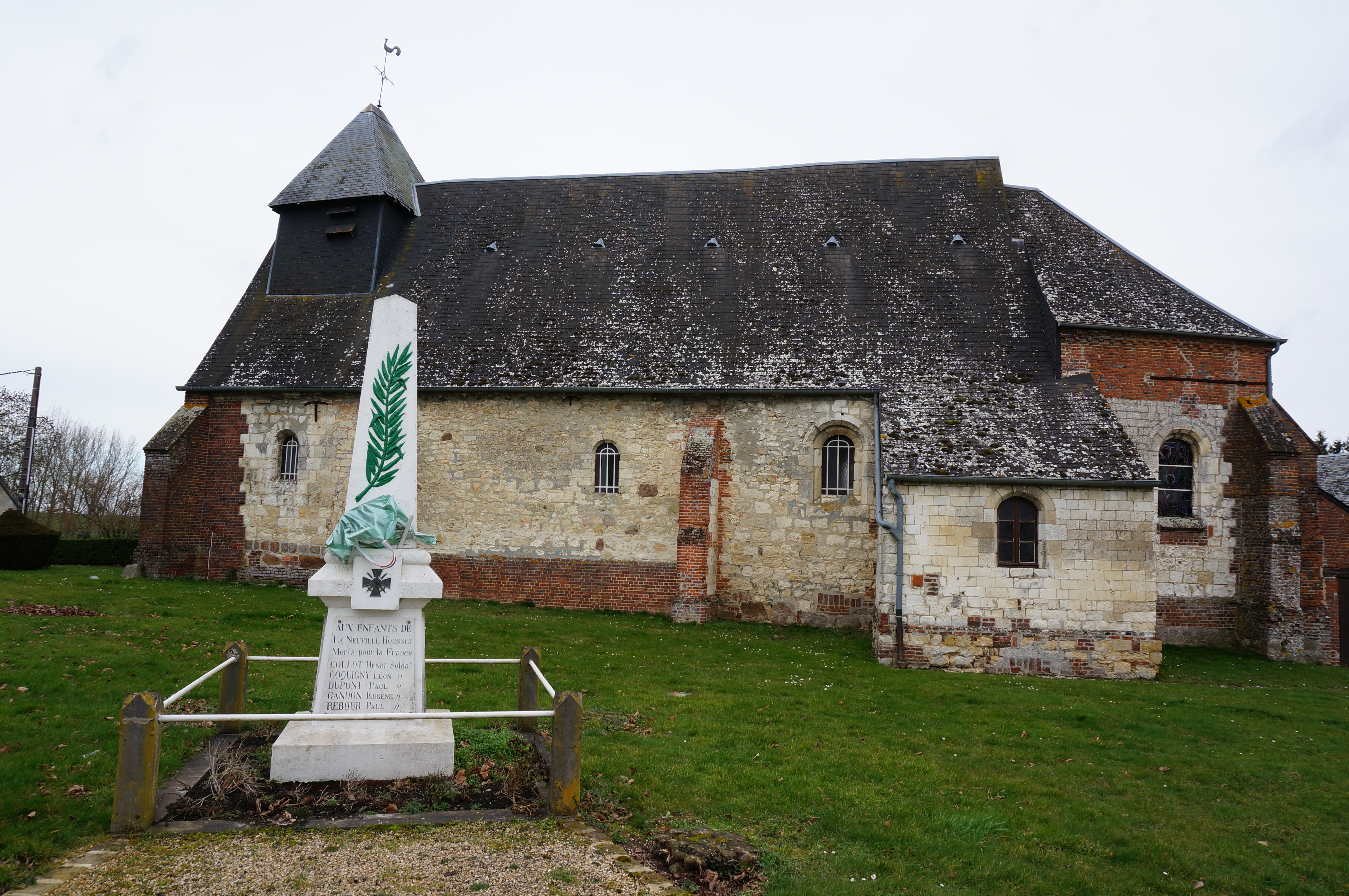 La Neuville-Housset, vue du village.